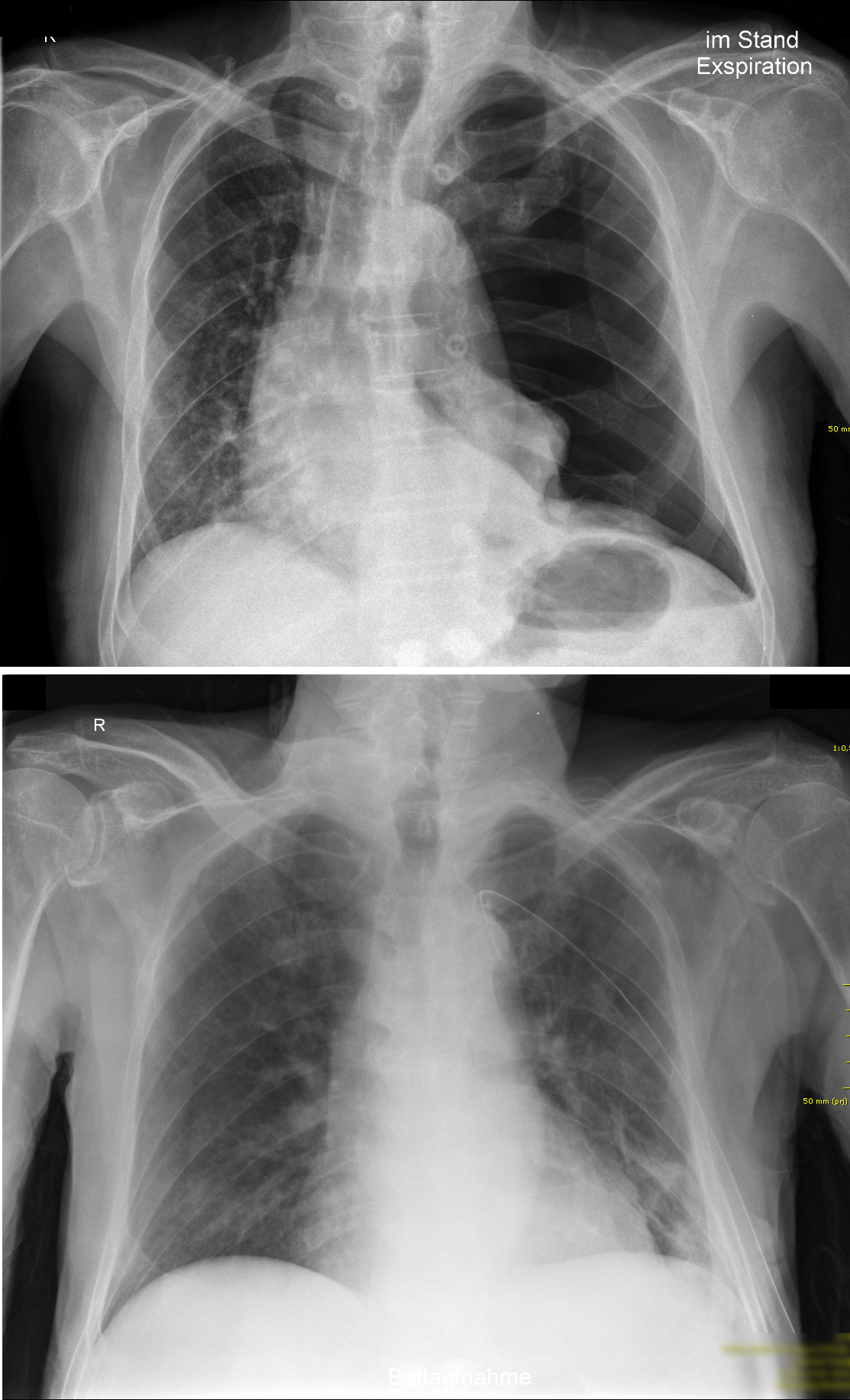 Ein linksseitiger Spannungspneumothorax vor (oben) und nach (unten) Anlage einer Thoraxdrainage. Gut zu sehen ist die Verlagerung des Mediastinums hin zur gesunden Seite sowie die fehlende Lungenzeichnung im linksseitigen Pneumothorax.